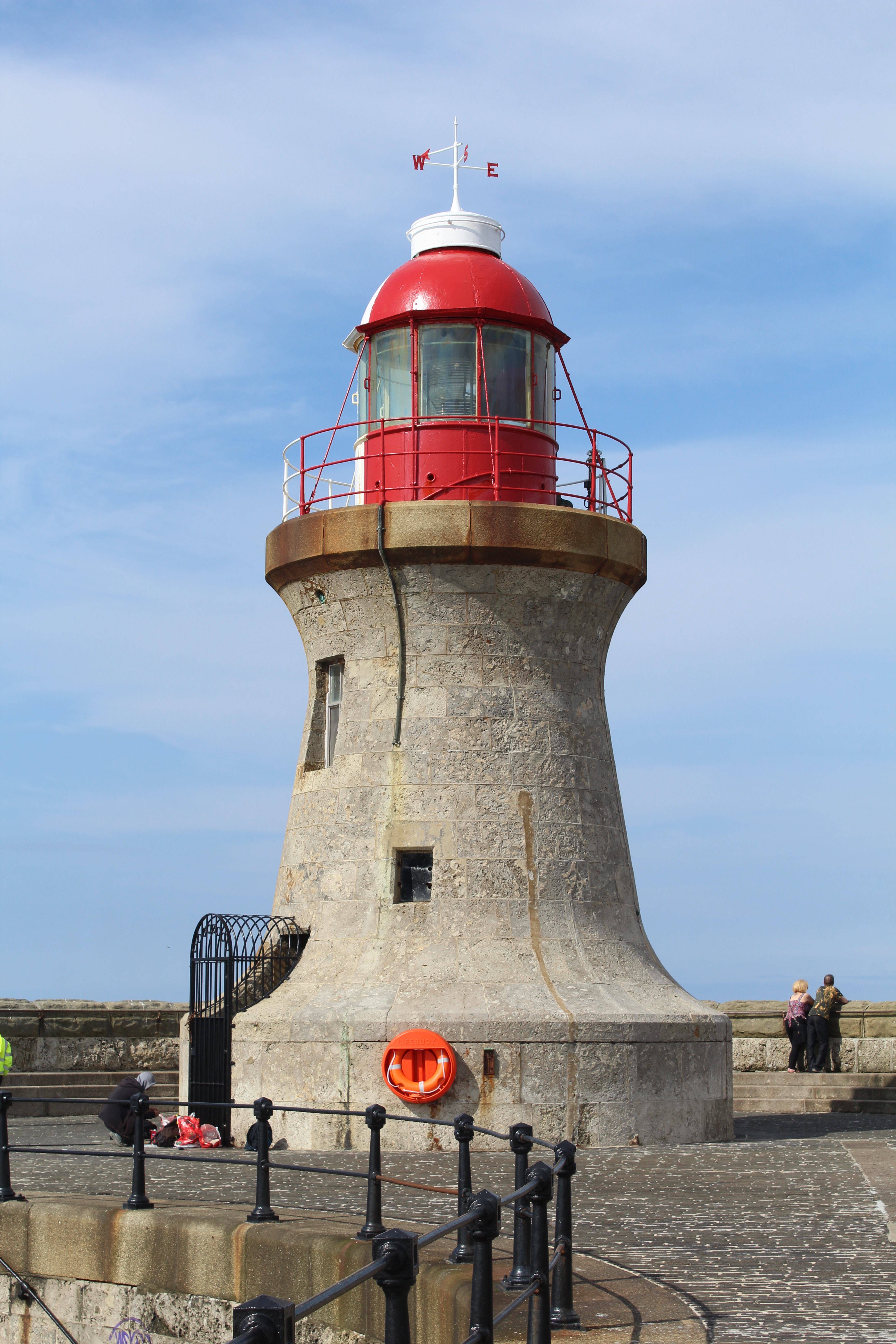 Phare de la Jetée Sud du Tyne, South Shields, South Tyneside.